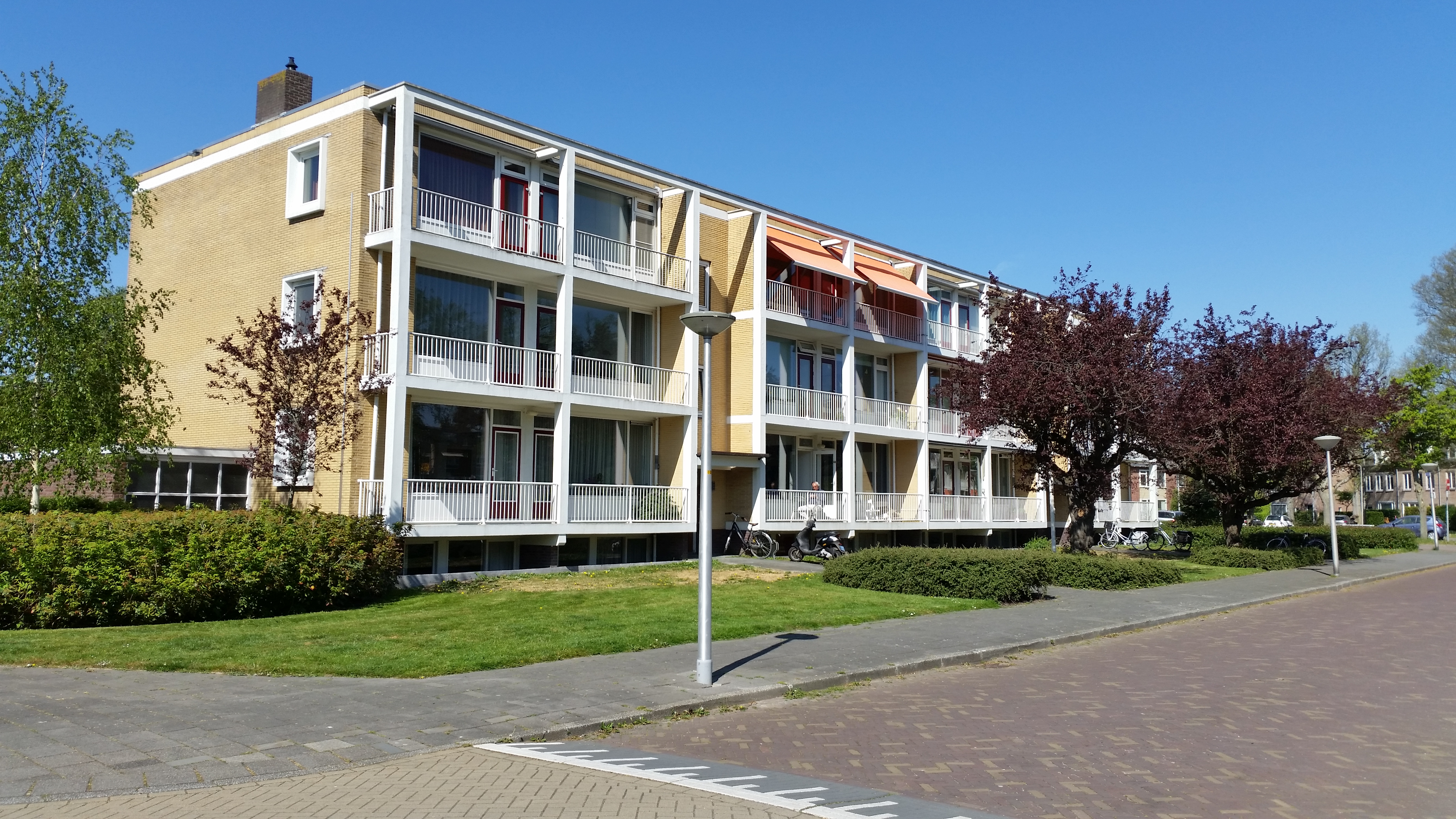 Gecombineerd gemeentelijk monument aan de Keizer Karelweg, Amstelveen (april 2020)